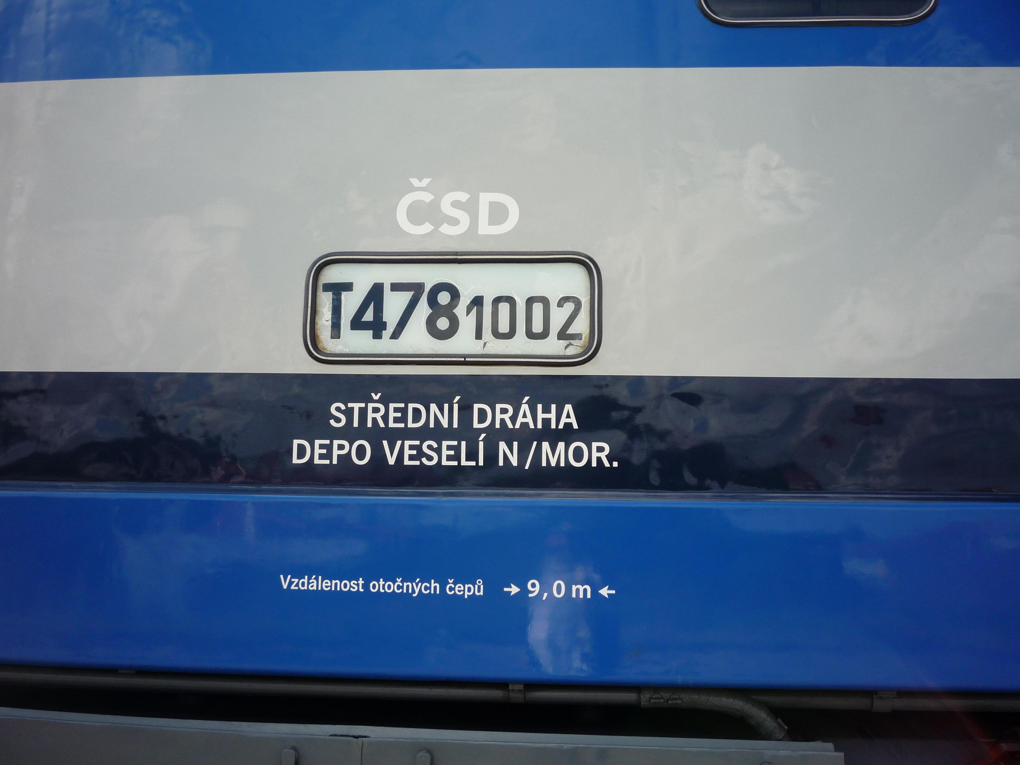 Autor fotografie Jiří Zelenka. Motorová lokomotiva T478.1002 - Dnes v LD Veselí n/M slouží jako muzejní exponát DHV Lužná u/R. Tato lokomotiva nahrazuje původní parí lokomotivu na trase akce Legiovlak. Czech Republic.